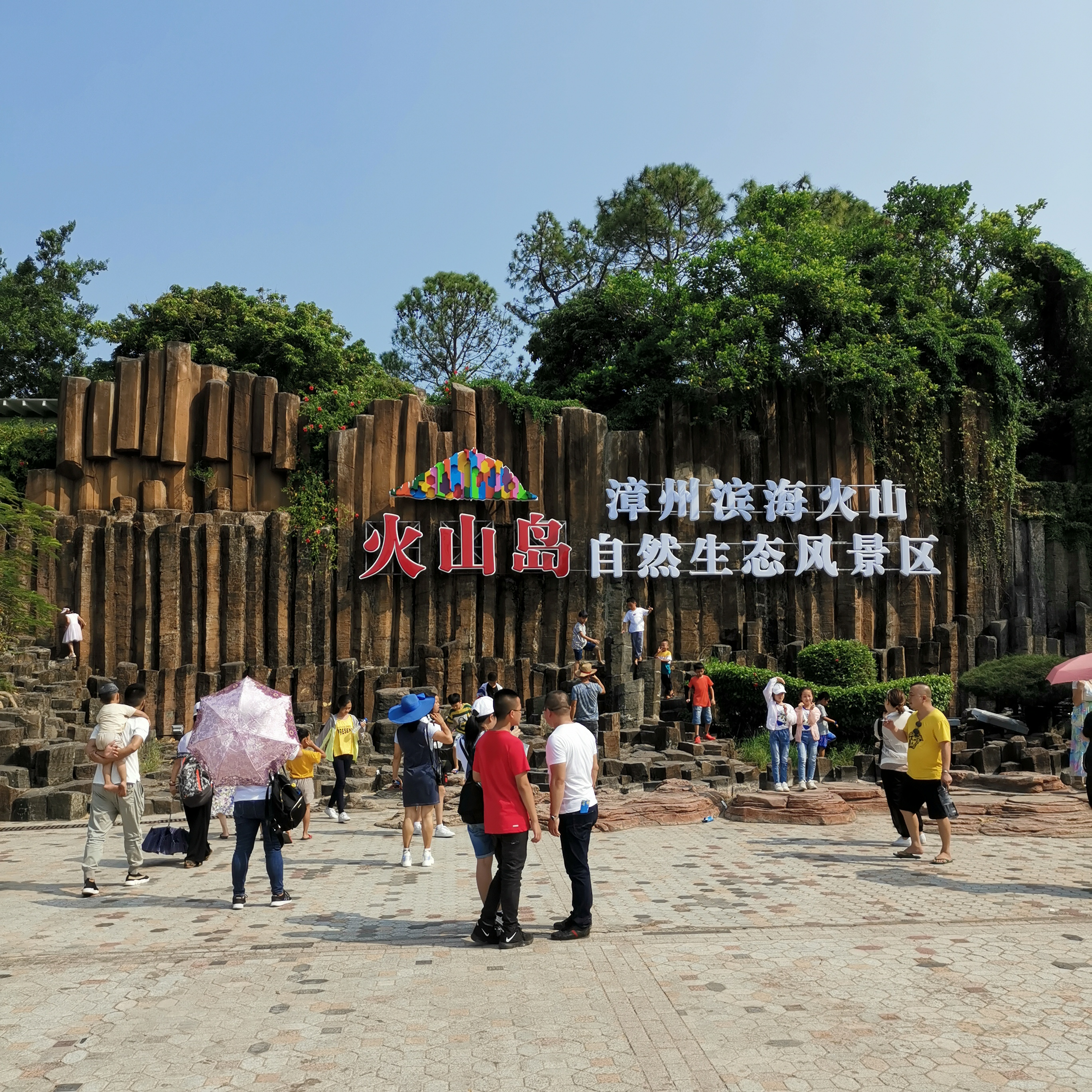 中文（中国大陆）: 漳州滨海火山国家地质公园